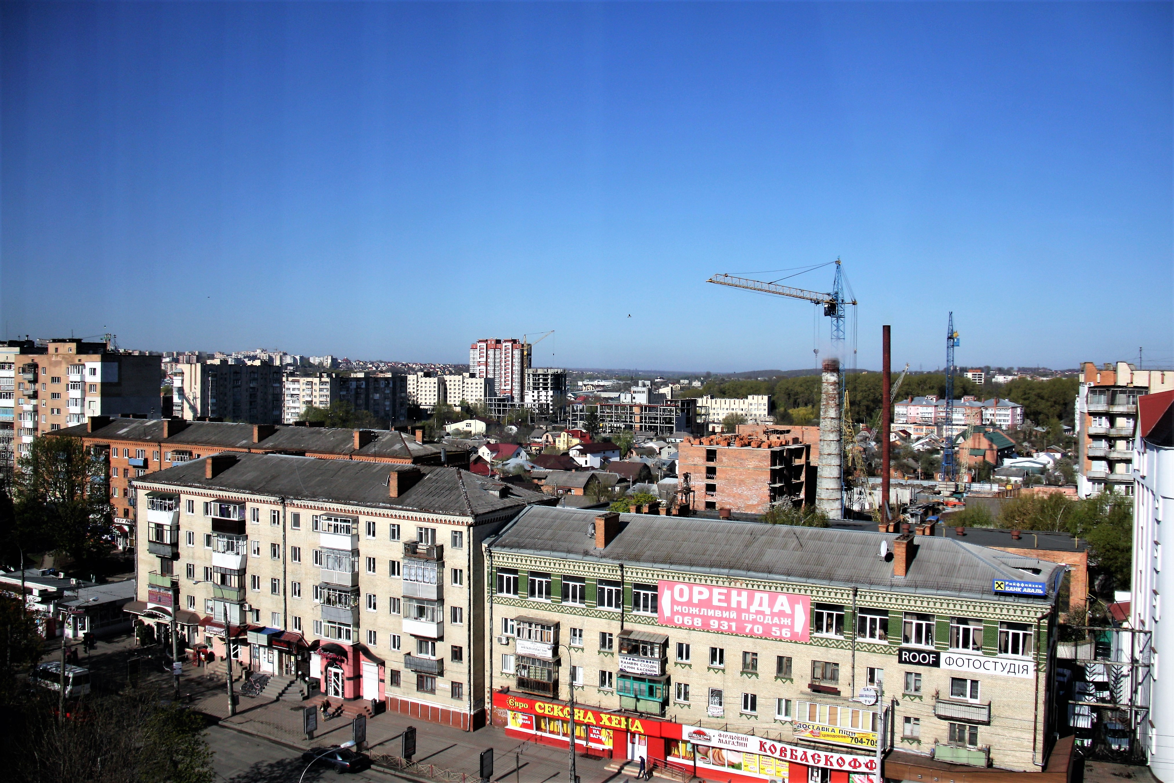 Панорама мікрорайону Нові Гречани, Хмельницький